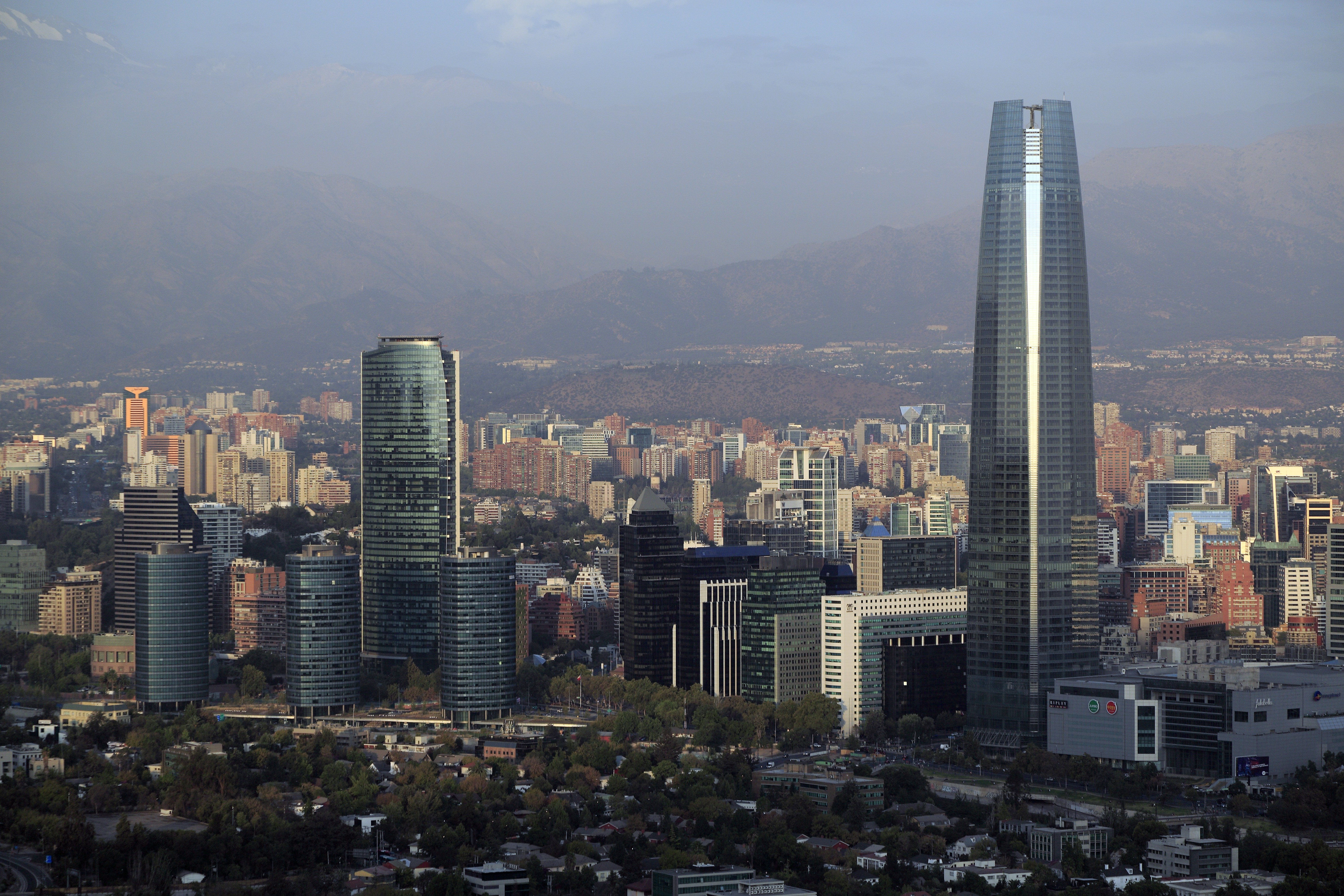 Ein erst nach 2000 entstandenes Gebiet mit einer großen Hochhausdichte, die meisten werden von Banken genutzt. Der Turm rechts ist der Gran Torre Santiago, die höchsten Gebäude von Lateinamerika.